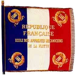 Drapeau